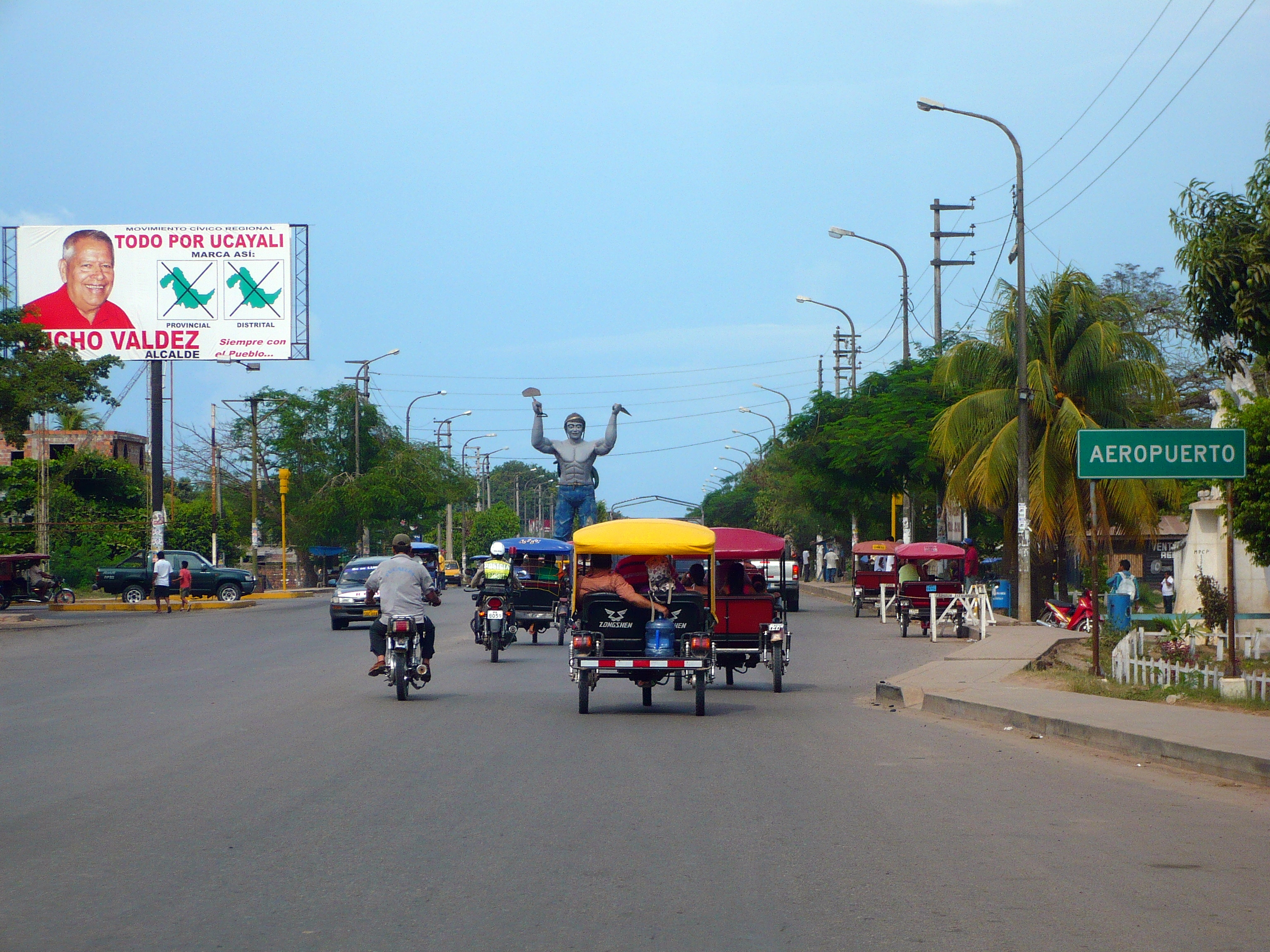 Límite de la avenida centenario observando al agricultor pucallpino en mencionada ciudad.